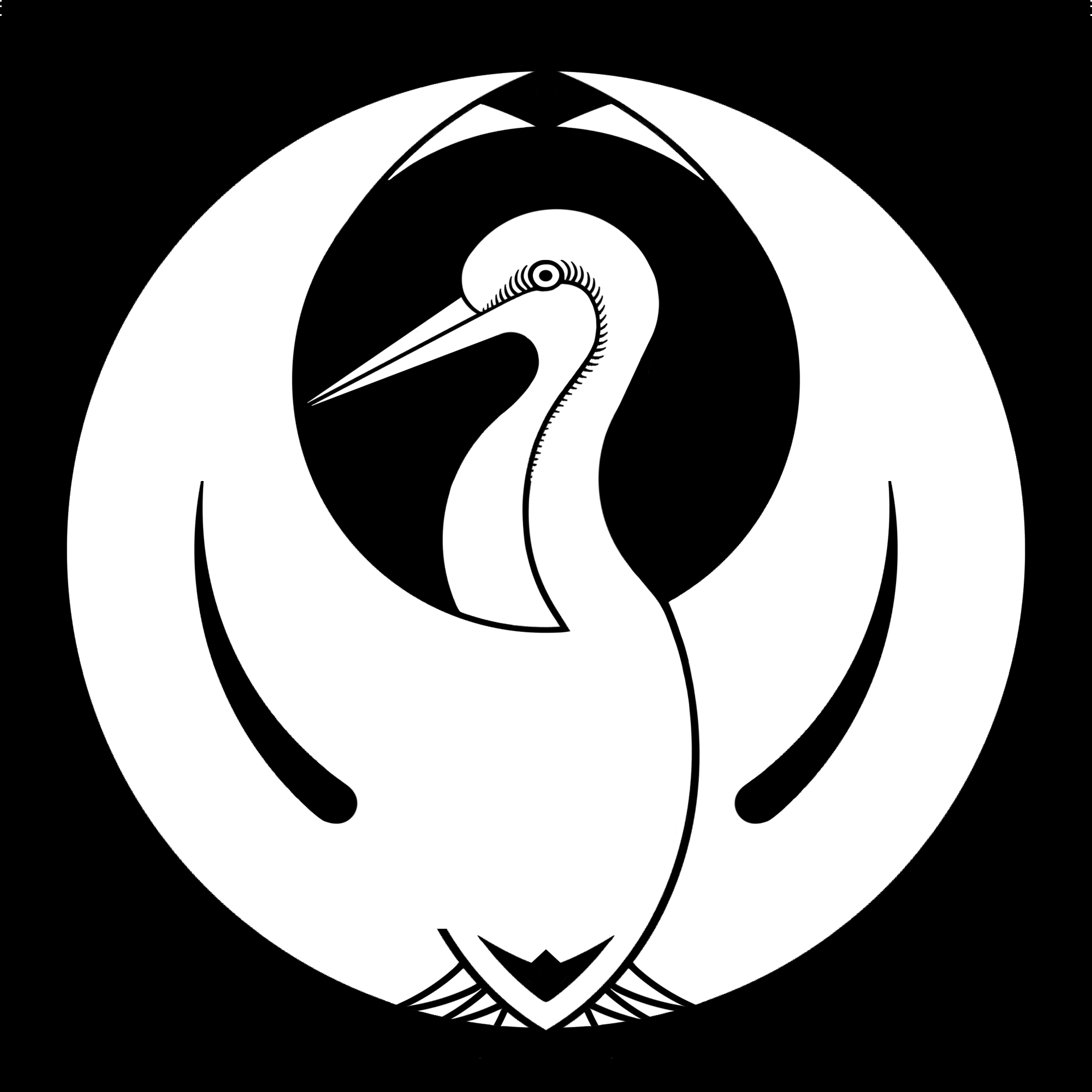 「音羽屋鶴の丸」紋（染抜）、坂東彦三郎一門の定紋